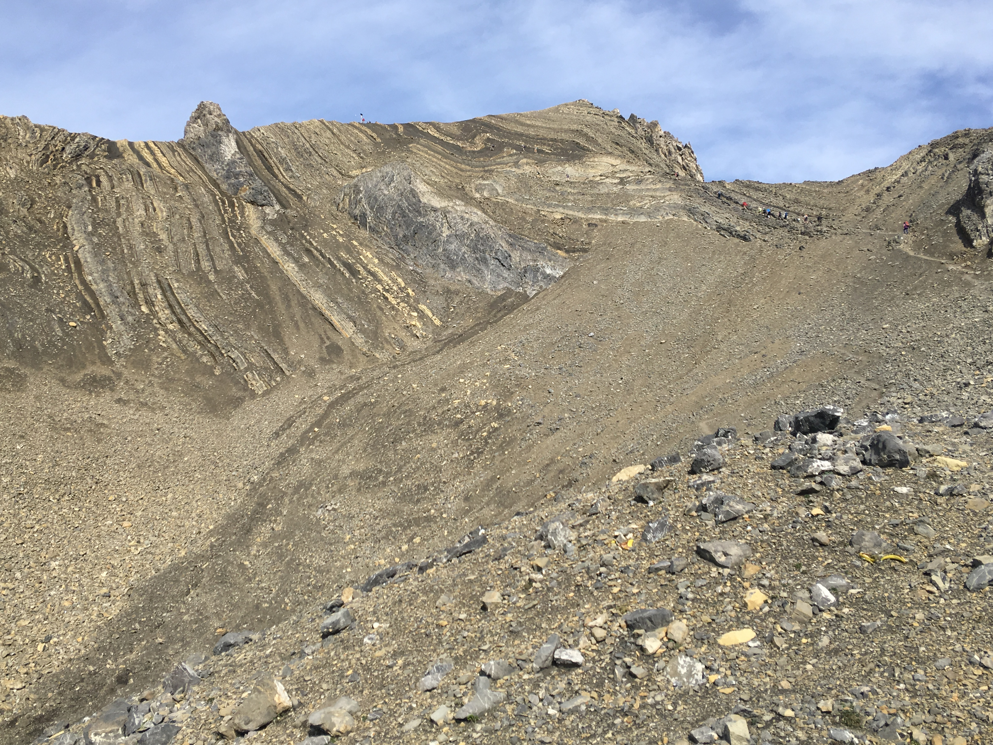 Cirque du Schesaplana depuis TotalpHütte / SchesaplanaHütte